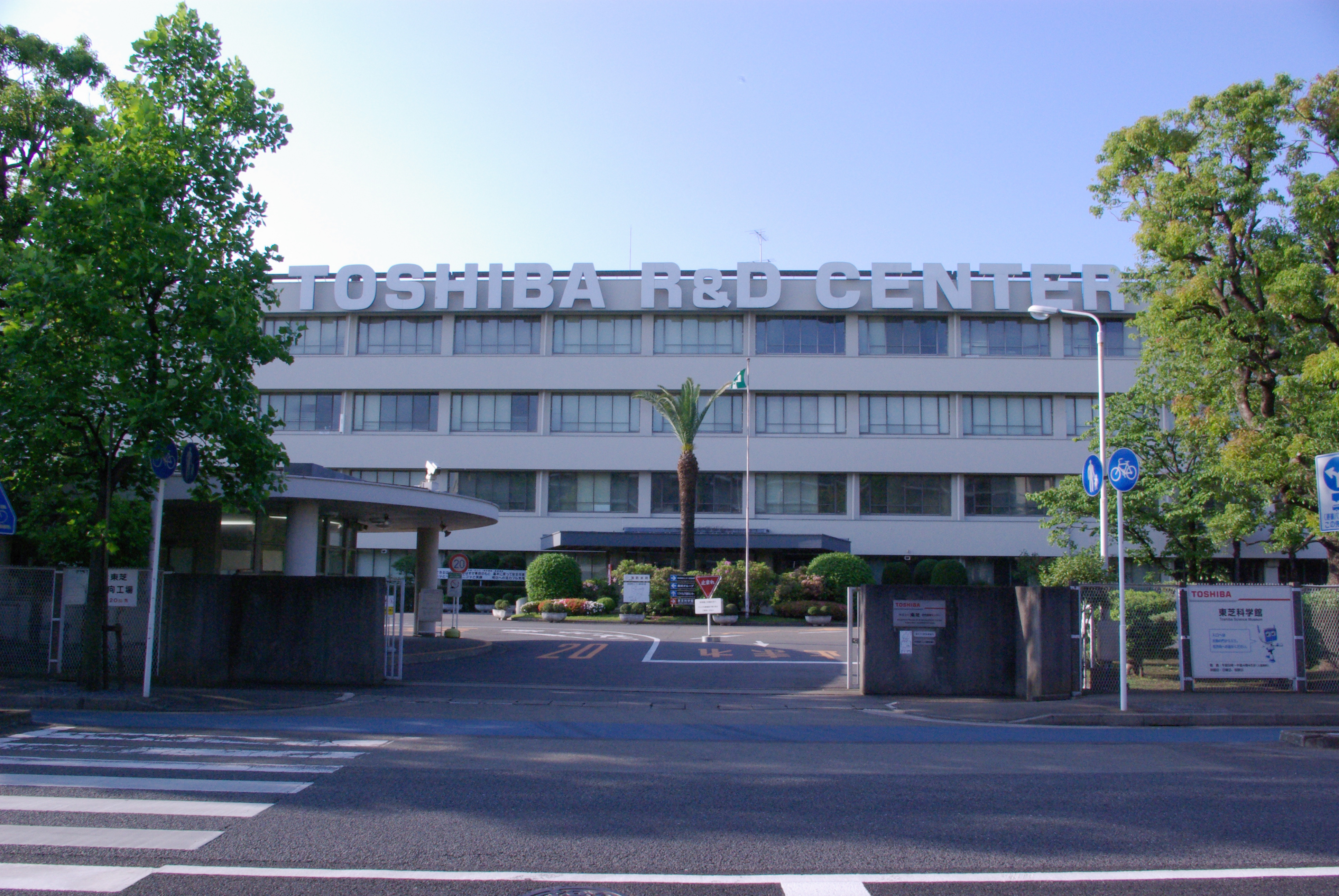 TOSHIBA R&D Center(Komukaitoshiba, Saiwai, Kawasaki, Kanagawa, Japan)